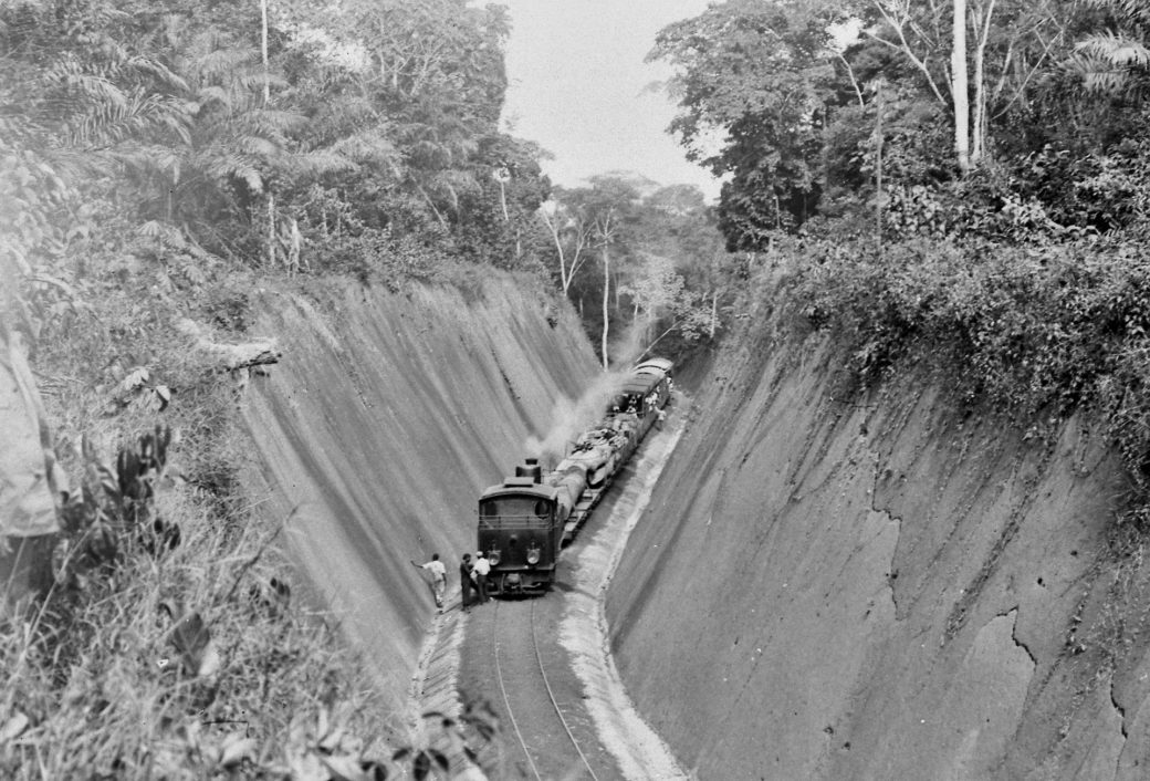 Die Nordbahn in der deutschen Kolonie Kamerun